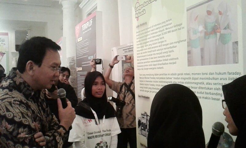 Dialog Siswa dg P'Ahok - SMAN 1 Bojonegara Juara 3 dan Favorite LGIS 2016 (Girl In Science)